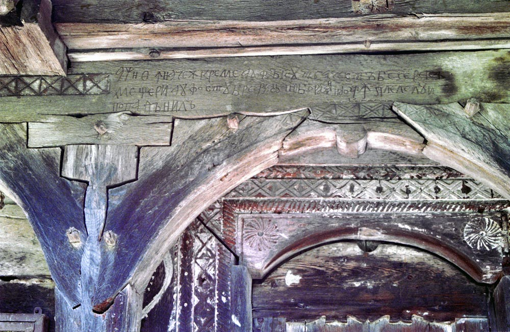 Biserica de lemn din Brebi, inscripţia peste intrare pe fruntarul prispei.